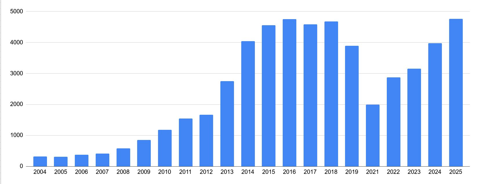 Une diagramme en rectangles représentant le nombre d'arrivants au Marathon de Porto.